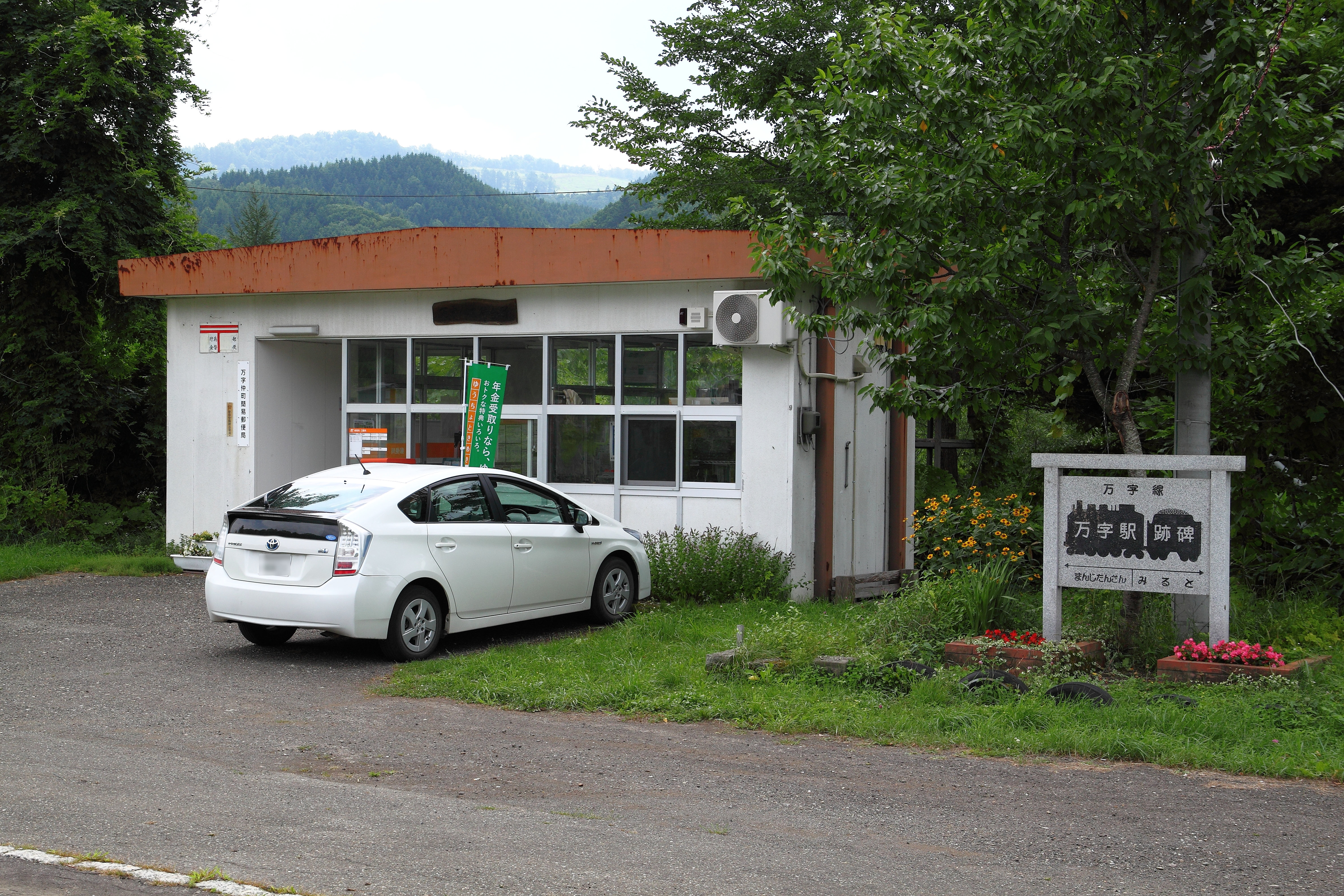 万字線ja:万字駅にある万字駅（現万字仲町簡易郵便局）と万字駅跡の駅碑。